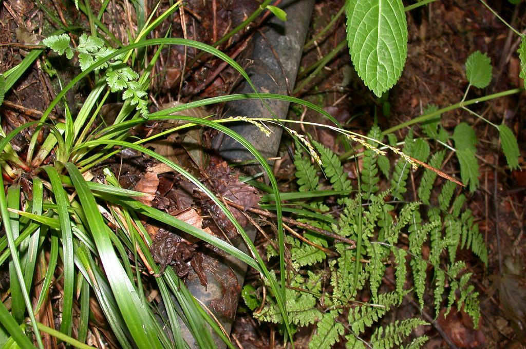 Carex multifolia:ミヤマカンスゲ 2003/06/15 富山県宇奈月温泉：Toyama Pref. Japan